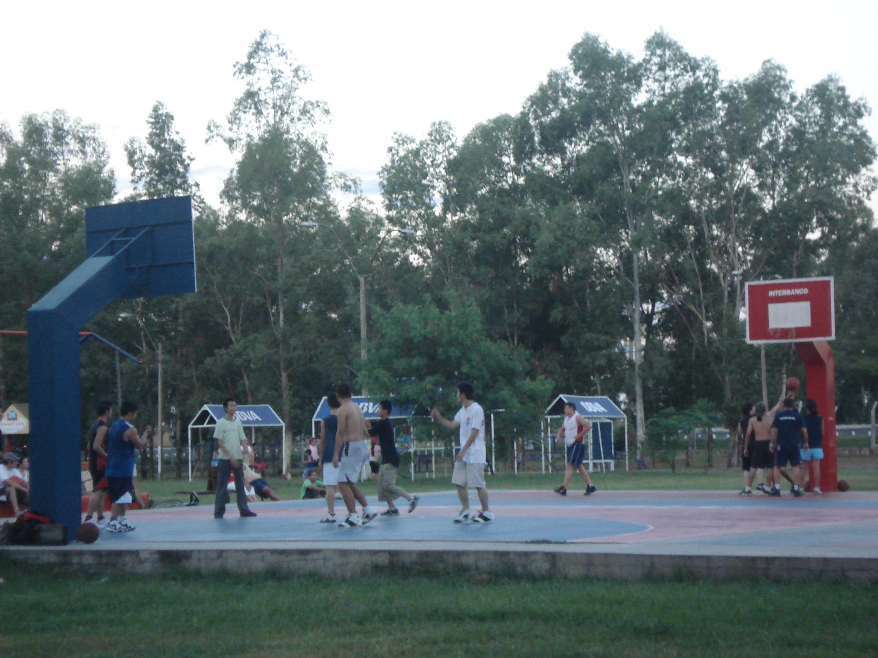 Ñu Guasu Area deportiva